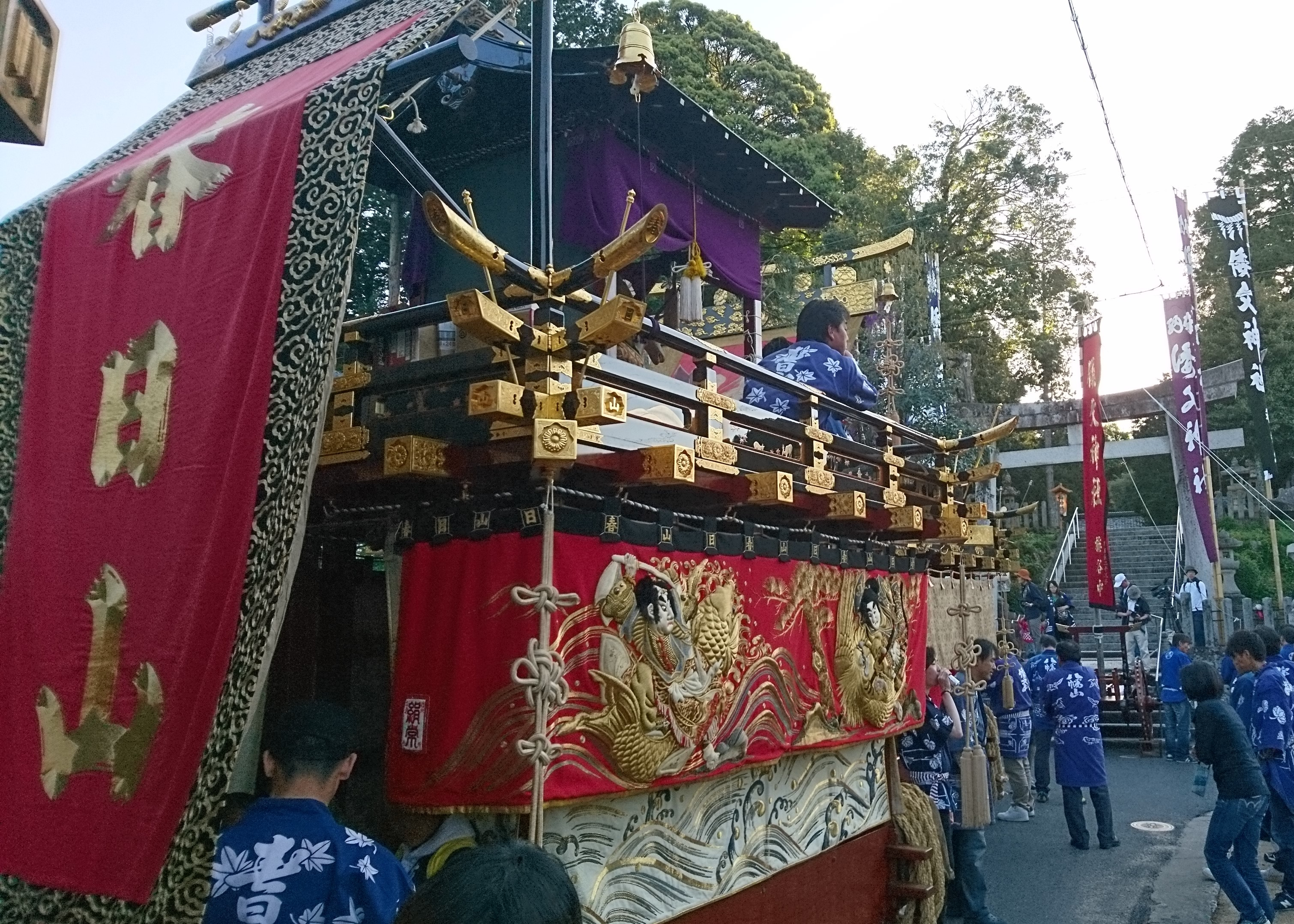 京都府与謝野町三河内地区の倭文神社の祭礼行事、三河内曳山祭り